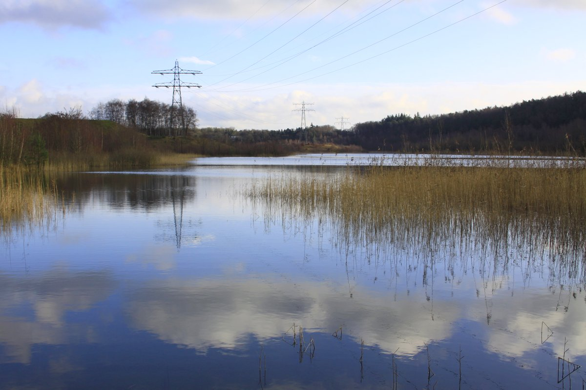 Nu puur natuur daar bij Maarn.